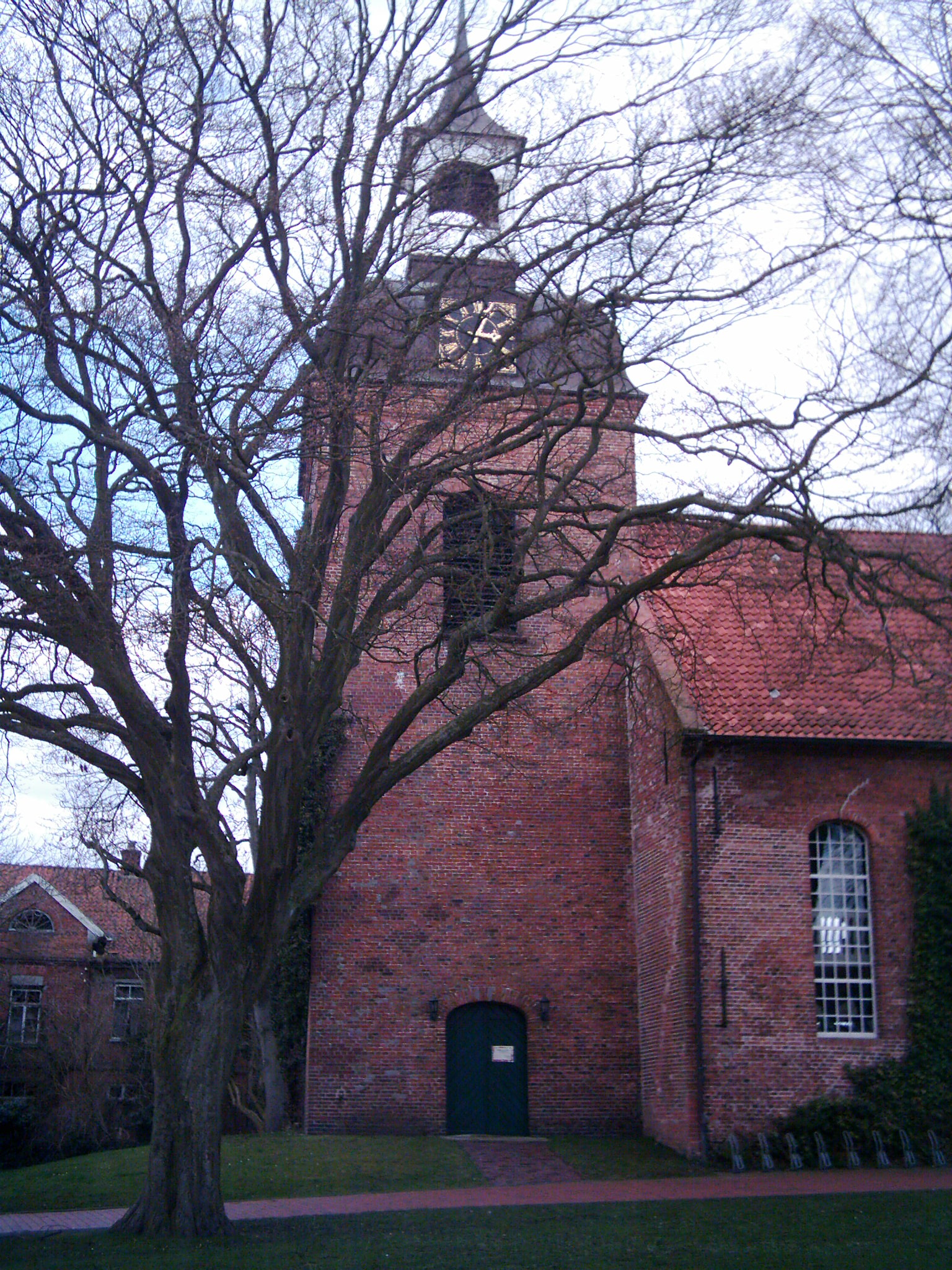 Westturm St. Nikolai